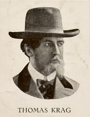 Beskrivelse / Description: Thomas Peter Krag / Plakat / Poster (Reklameplakater for bøker/book posters) Utgiver / Publisher: Gyldendal Størrelse / Size: 96 x 64 cm Dato / Date: [1918] Eier / Owner Institution: Nasjonalbiblioteket / National Library of Norway Lenke / Link: Bildesignatur / Image Number: no-nb_plktr_01875